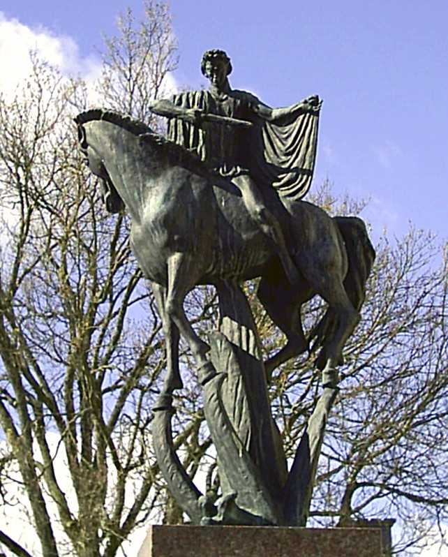 Carl Milles St Martin-staty 1951. Placerad vid residenset i Vänersborg. För att se statyn i helbild se sv::Bild:Carl Milles staty i Vänersborg (Helbild).jpg Fotograf: Tubaist